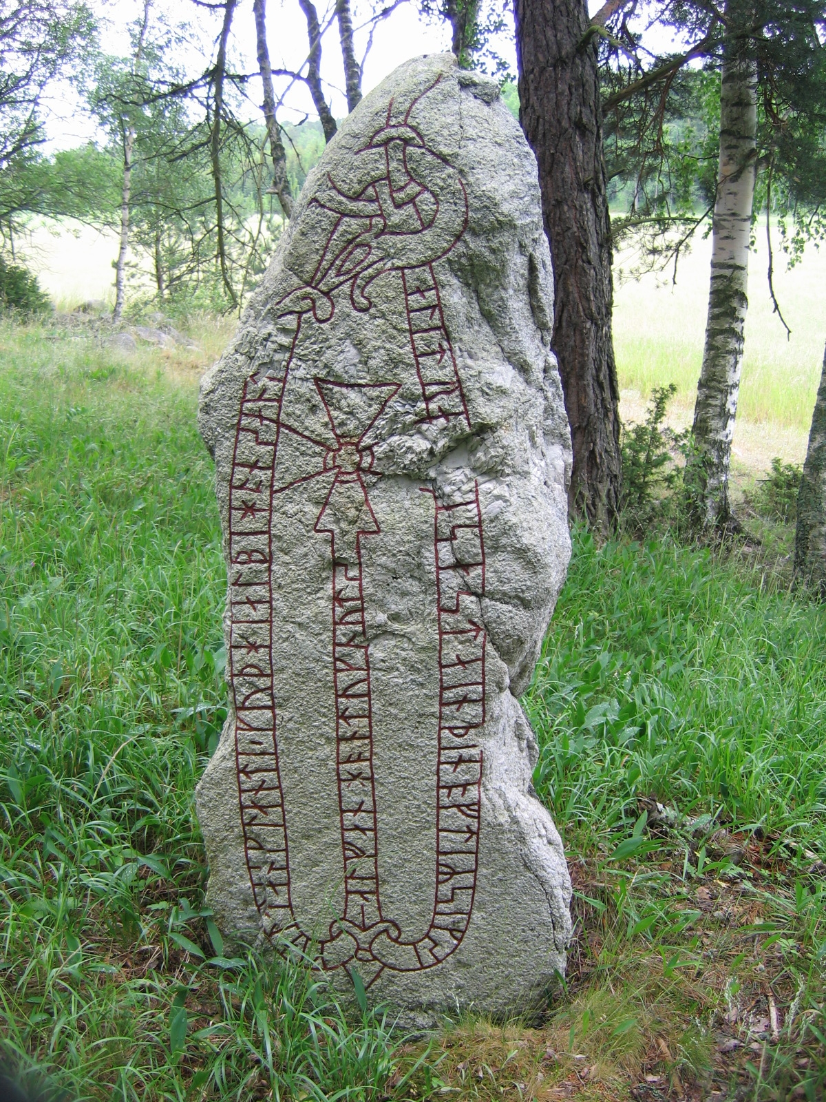 Runestone U 194 at Väsby, Uppland, Sweden.